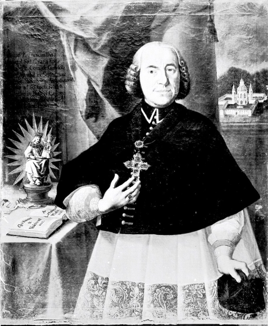 Retrato del obispo Francesco Gondola, raguseo.